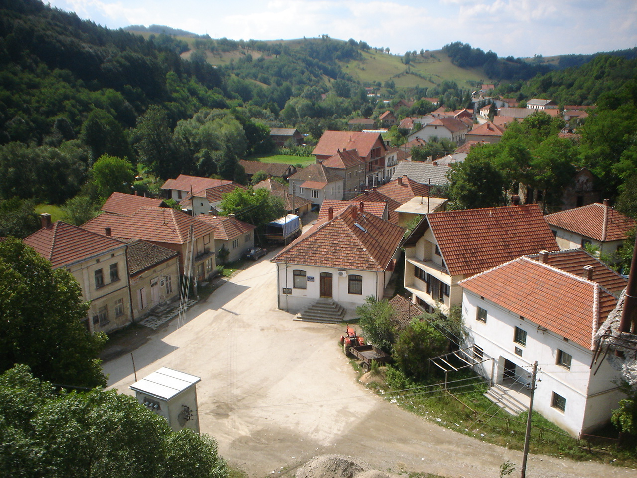 Selo Vlaole autor: Nenad Milić